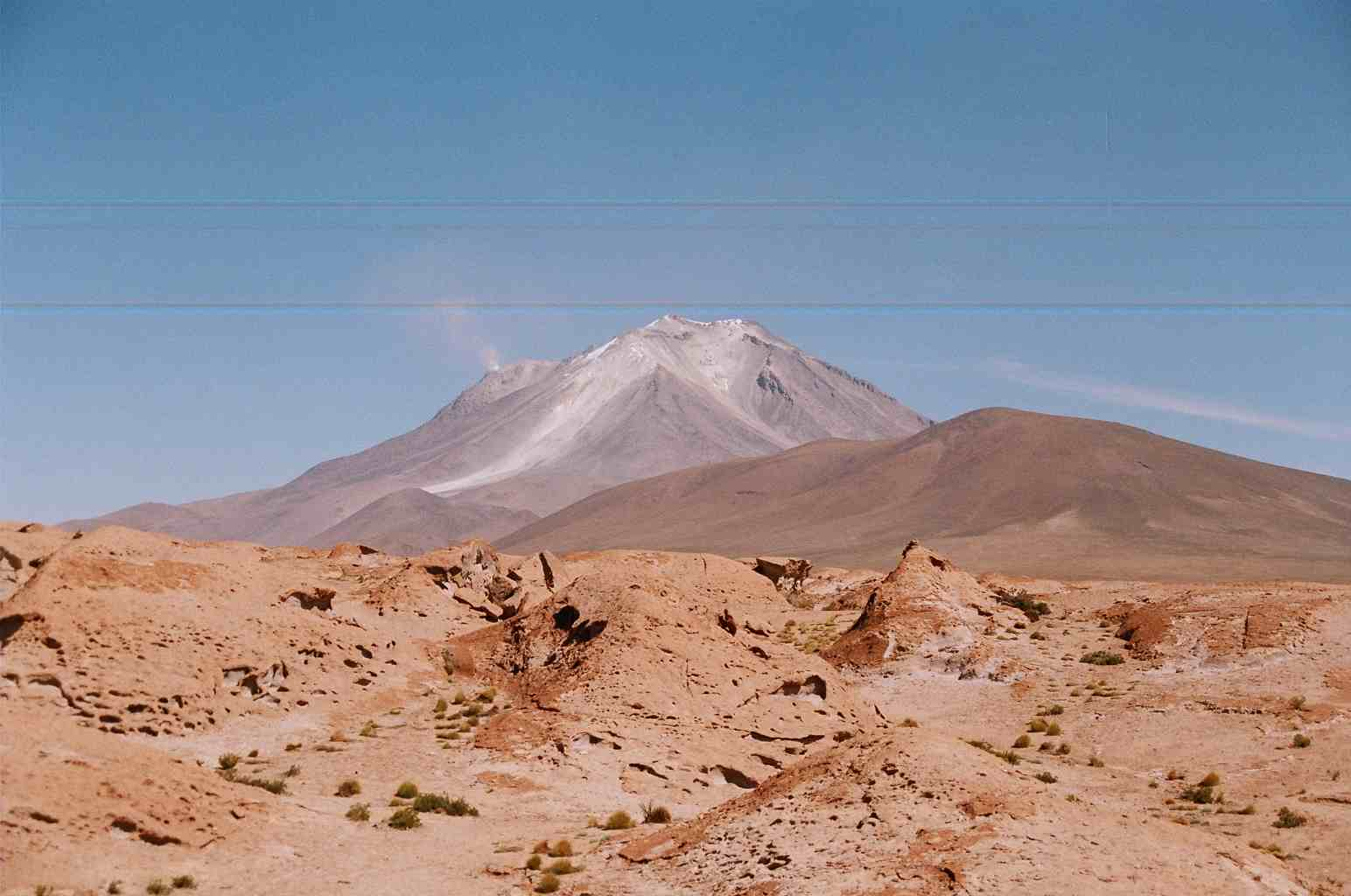 Volcán Ollagüe